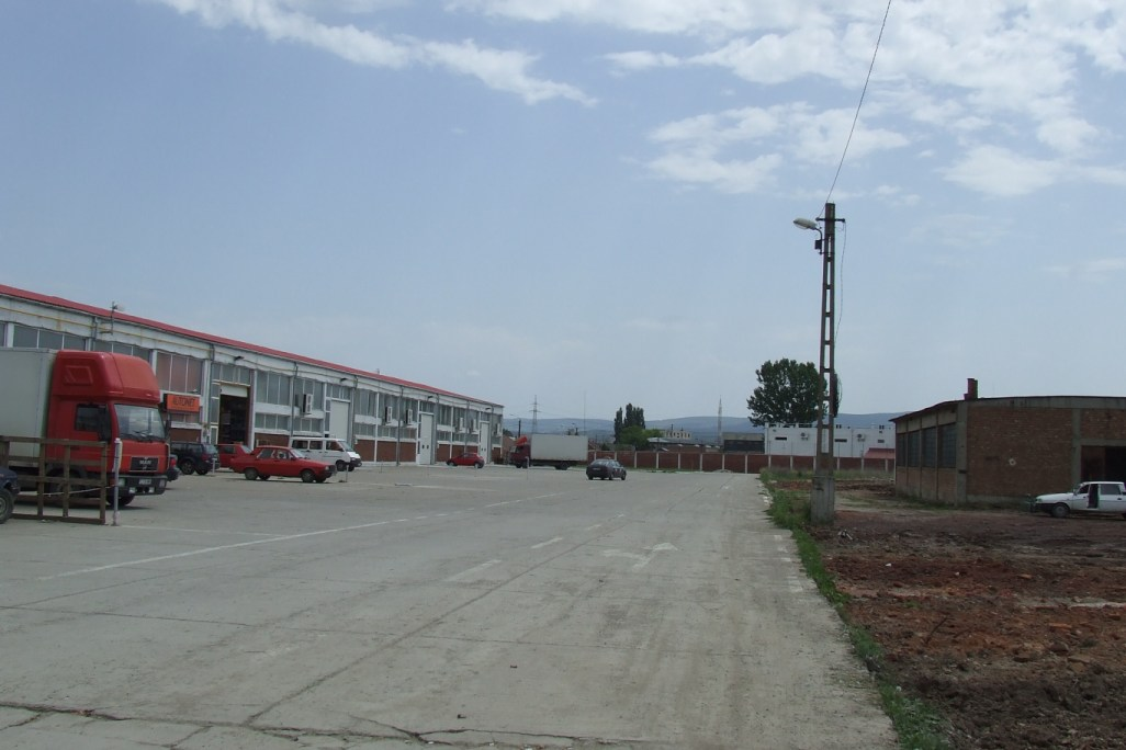 Cluj-Napoca Iris brickyard, Romania